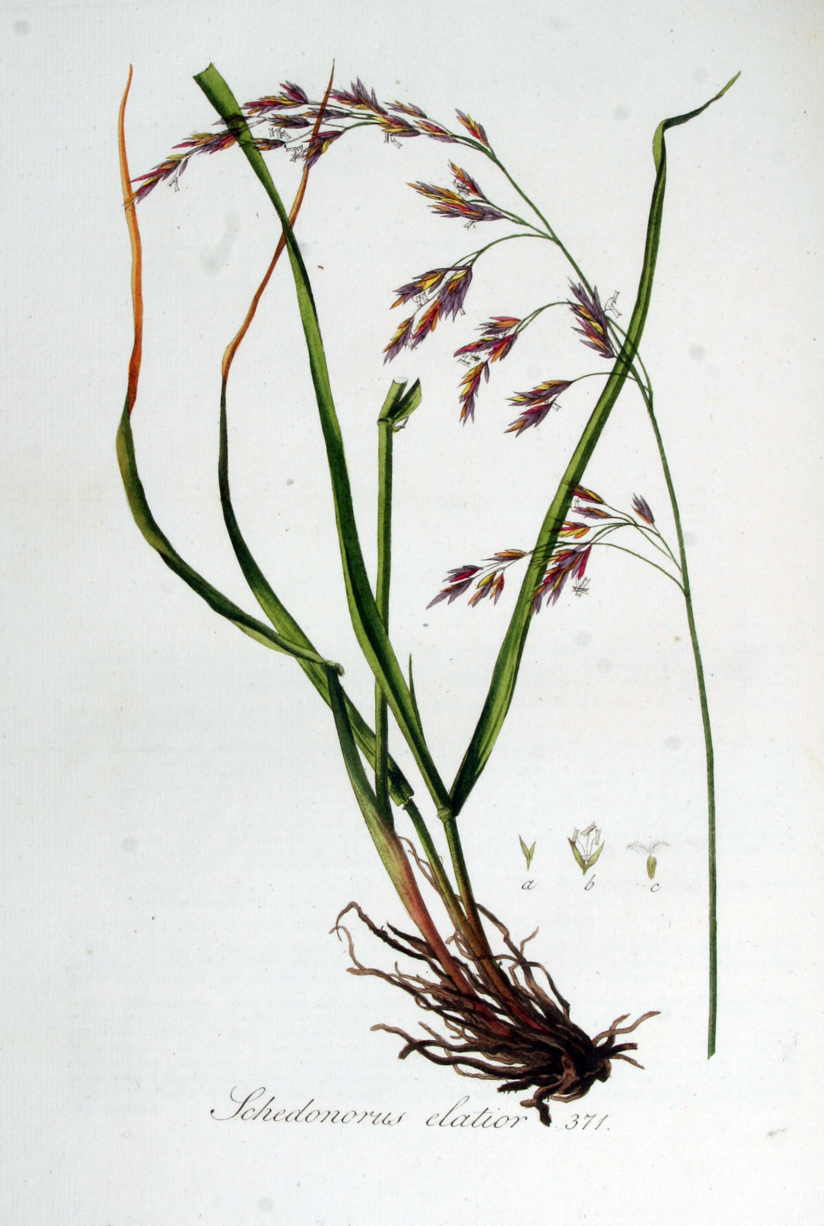 Festuca arundinacea Schreb. (Syn. Schedonorus elatior (L.) P. Beauv.)